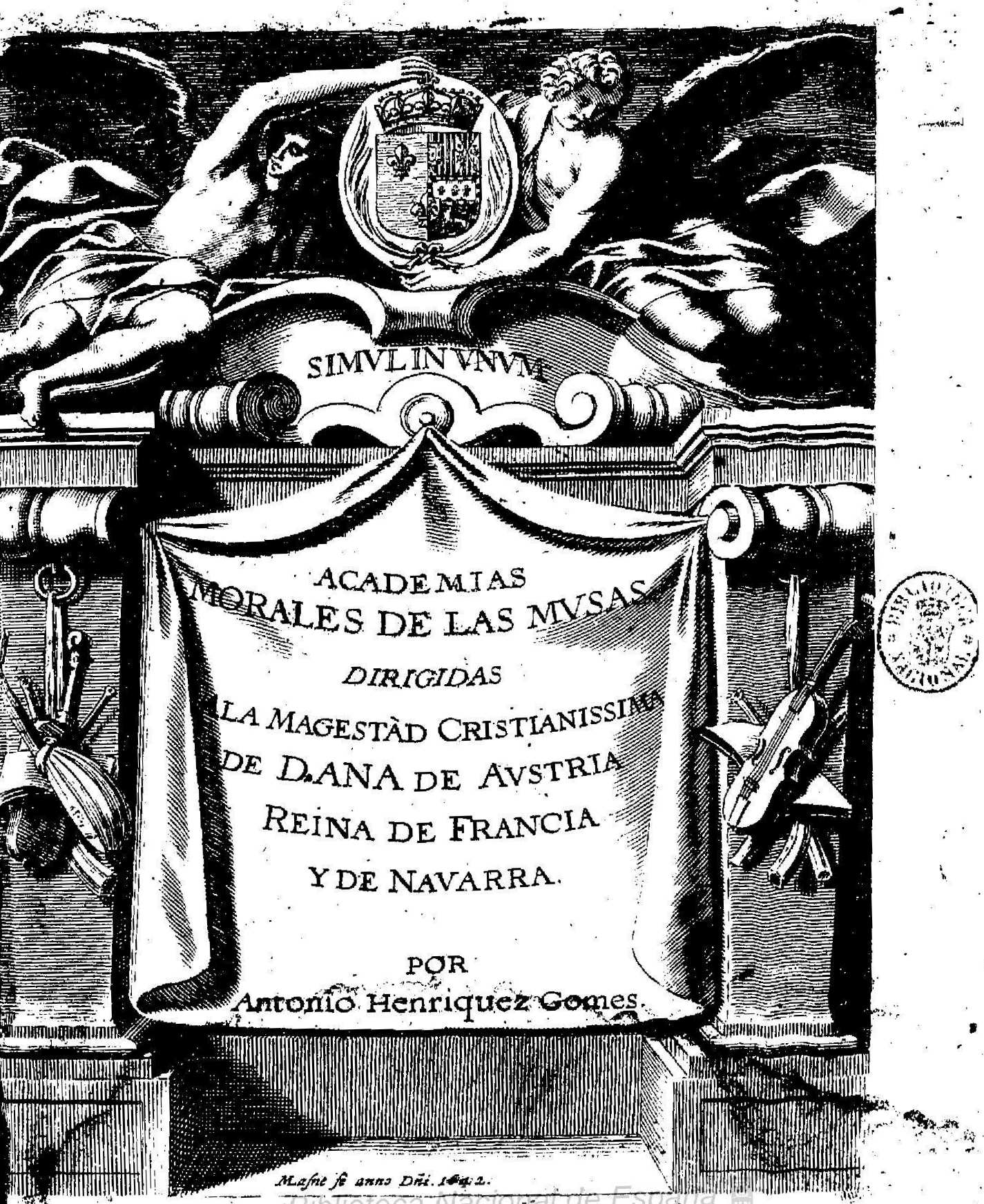 Portada calcográfica de Antonio Enríquez Gómez, "Academia morales de las musas", Burdeos, 1642. Firmado al pie MLasne fe anno Dn 1642 (ML enlazadas)